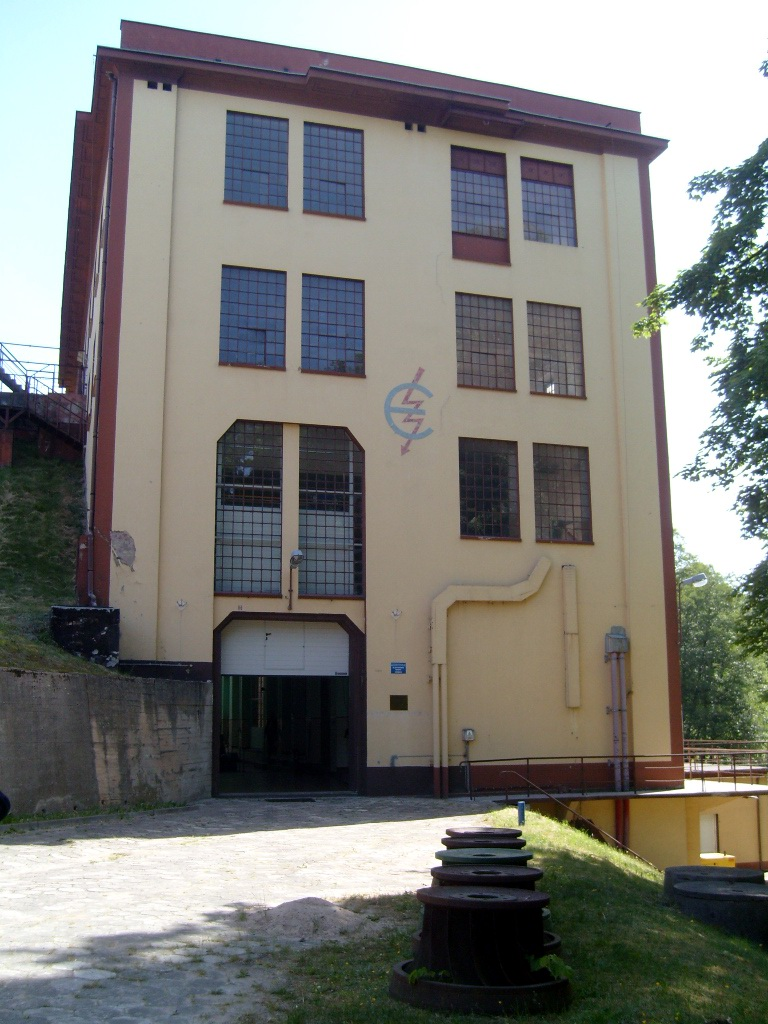 Budynek elektrowni w Gródku, woj. kujawsko-pomorskie, pow. świecki.